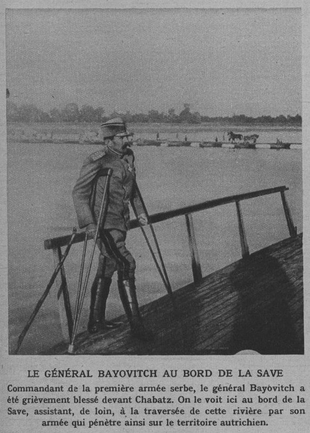 Le général Pierre Bojovich se remettant de sa blessure, vu ici su rle bord de la rivière Save.